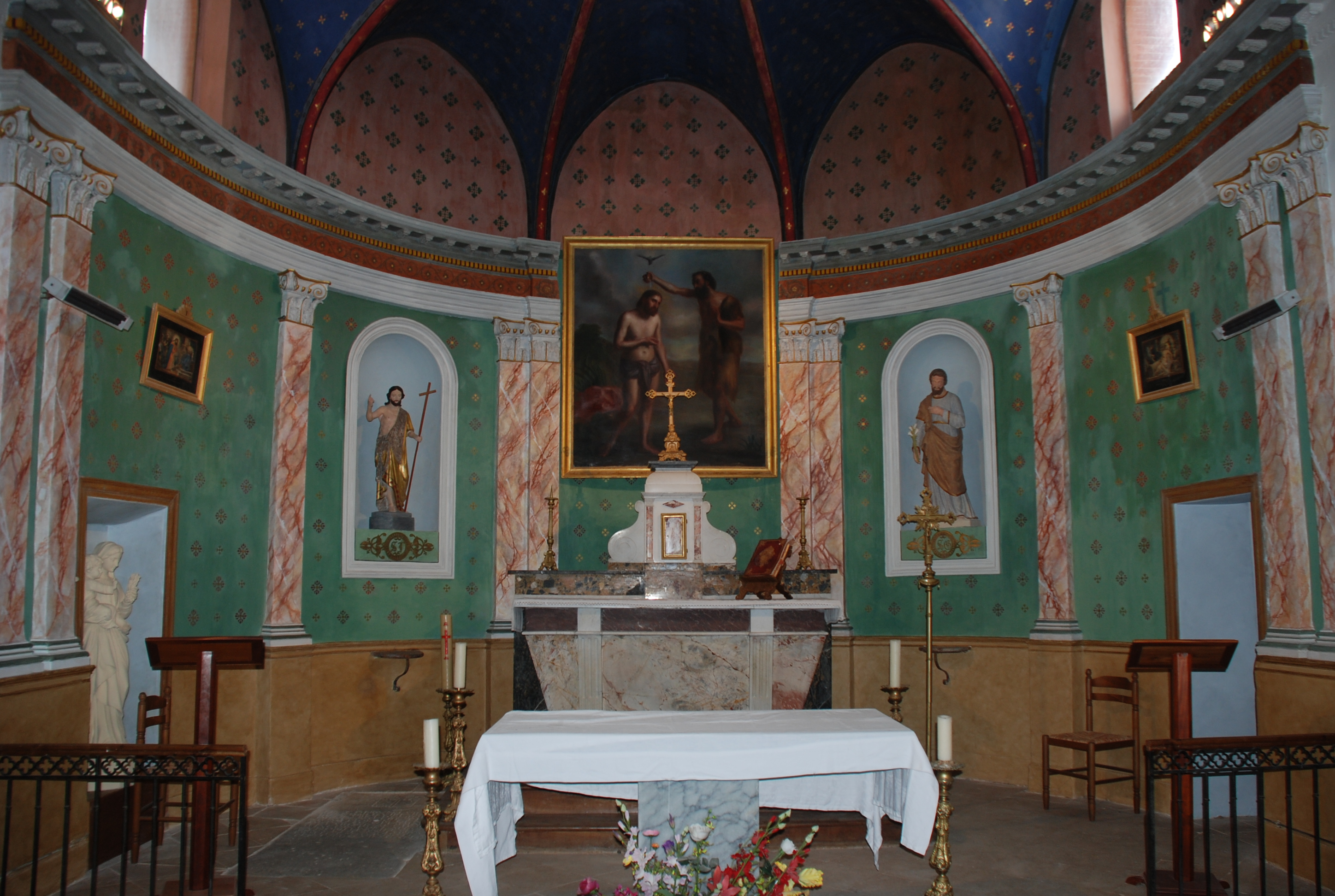 Chœur de l'église Saint Jean-Baptiste de Mervilla. La dalle funéraire de Fieubet est à gauche de l'autel